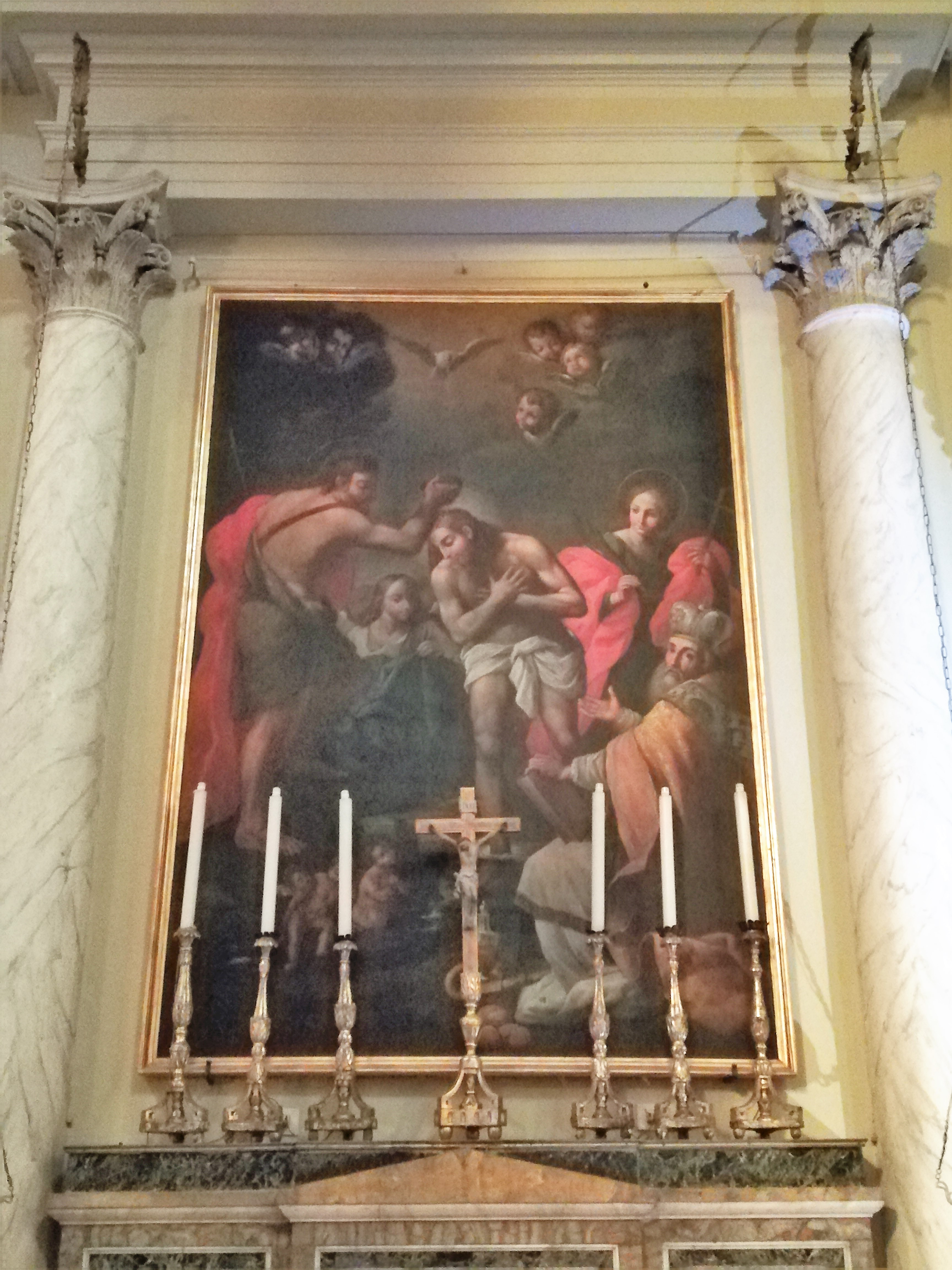 Battesimo di Gesù ritratto con San Giovanni Battista, Santa Venera e San Nicola di Bari, olio su tela, opera di Pietro Paolo Vasta custodita nella cappella eponima.